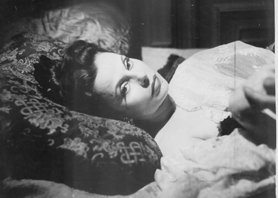 La actriz Ana María Lynch como La Quintrala – Doña Catalina de los Ríos y Lisperguer- Pelicula Argentina de 1955, dirigida por Hugo del Carril.